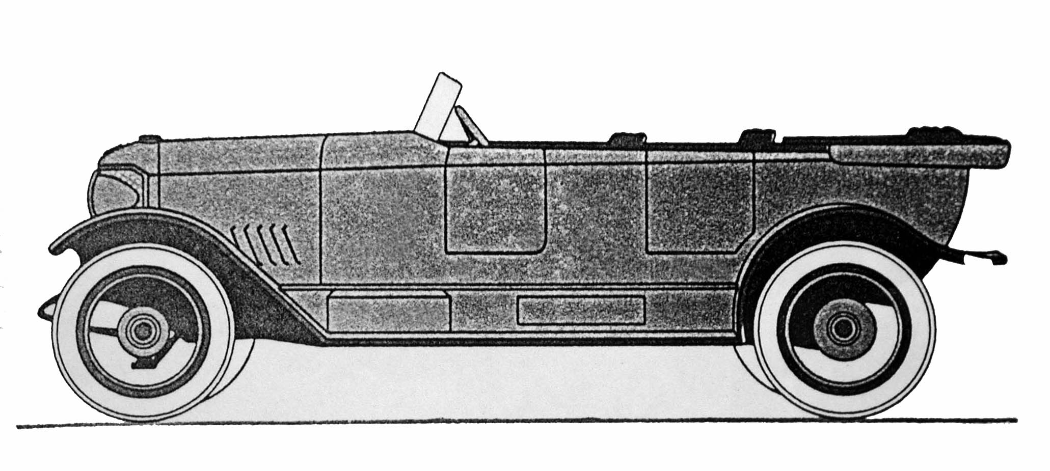 Selve 8/32 PS, 1922-1925, phaéton, carrosserie de série International